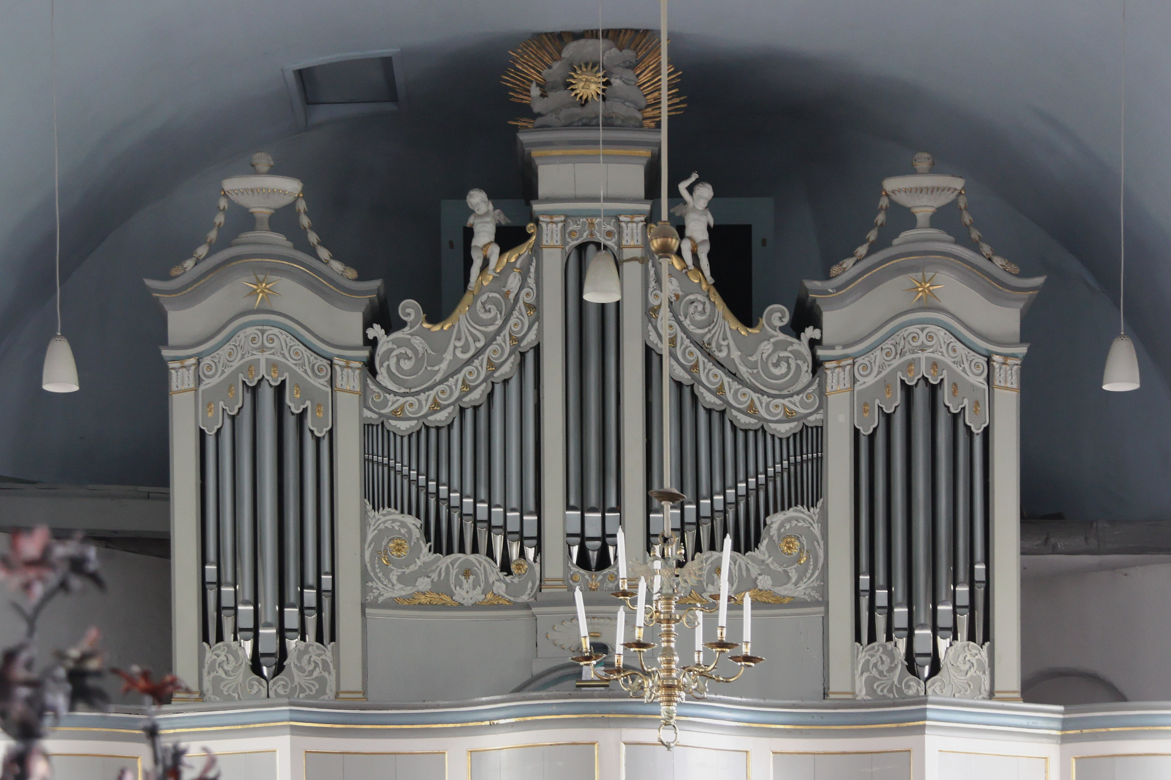 Sankt Johannis, Hamburg-Neuengamme, Hauptorgel. Ursprünglich 1634 von Orgelbau Fritzsche errichtet, letzte Restaurierung 1998 durch Orgelbau Beckerath.This is a photograph of an architectural monument.